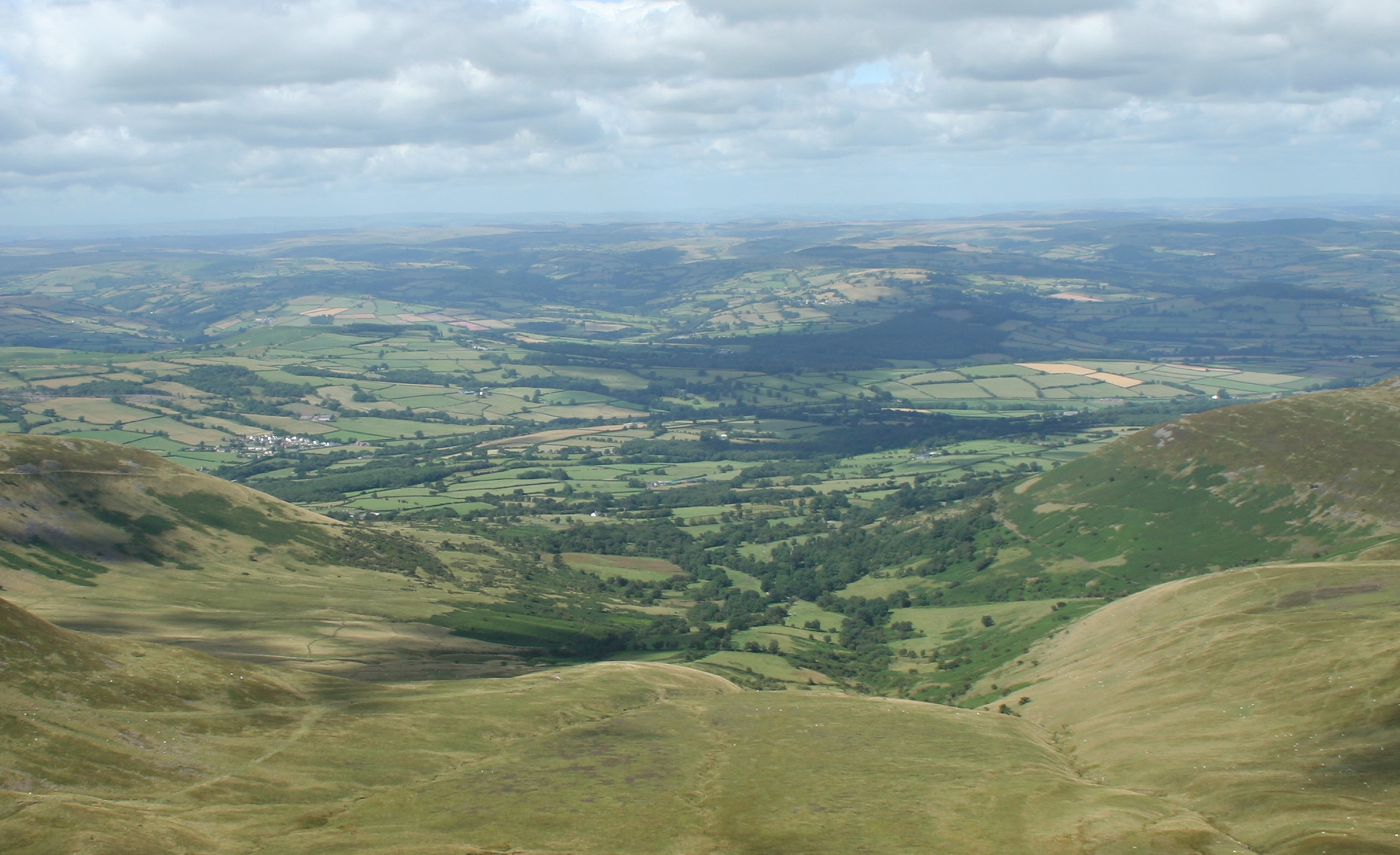 Heckenlandschaft nördlich des Corn Du (Brecon-Beacons-Nationalpark, Wales)